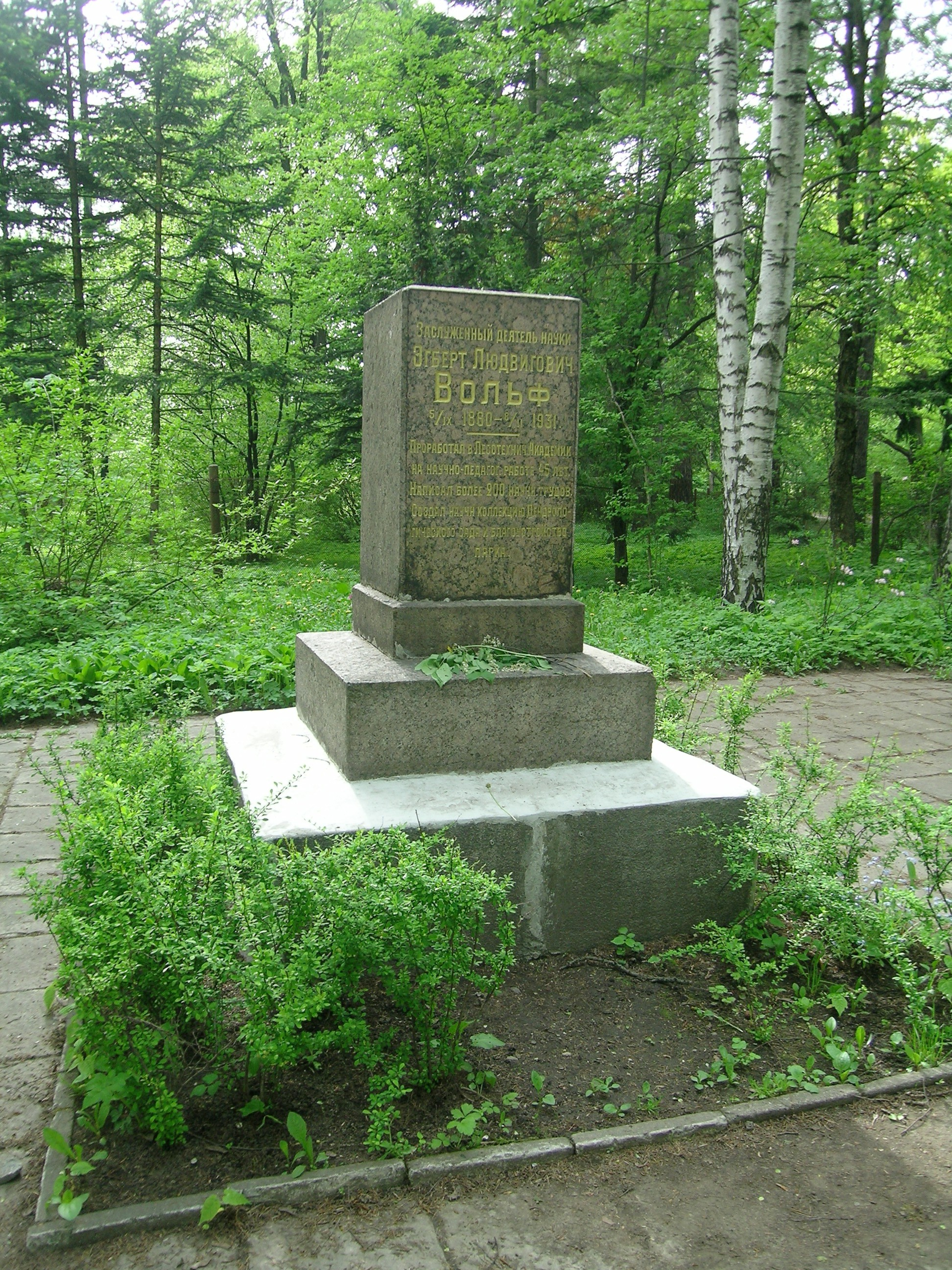 Лесотехническая академия Эгберт Людвигович Вольф. Заслуженный деятель науки. 1880—1931 Проработал в Лесотехнич.Академии на научно-педагог.работе 45 лет. Написал более 200 научн.трудов. Создал научн.коллекцию Дендрологического сада и благоустройство парка. Вечная память героям Октябьской революции